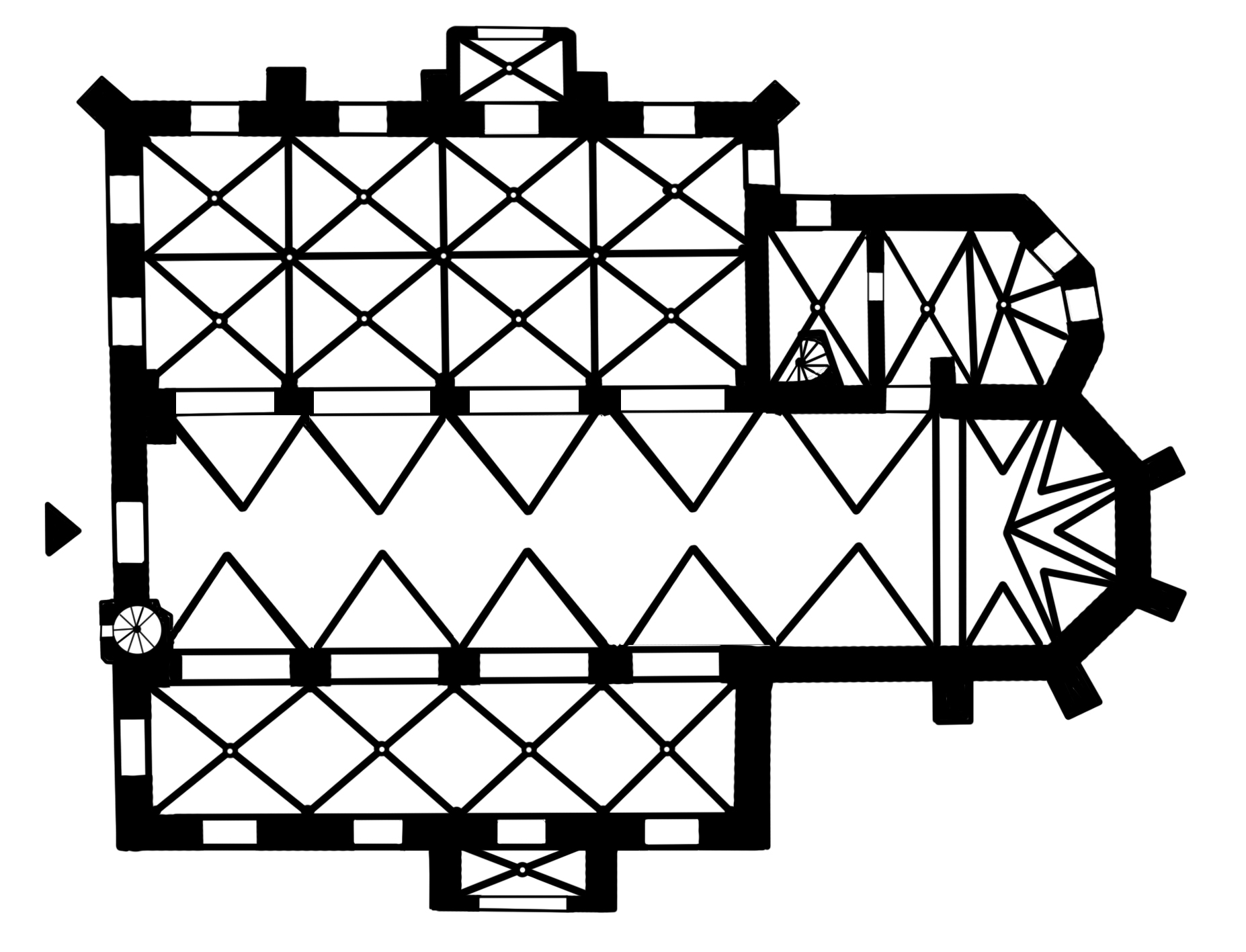 Floor plan